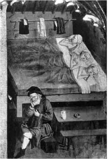 Llit